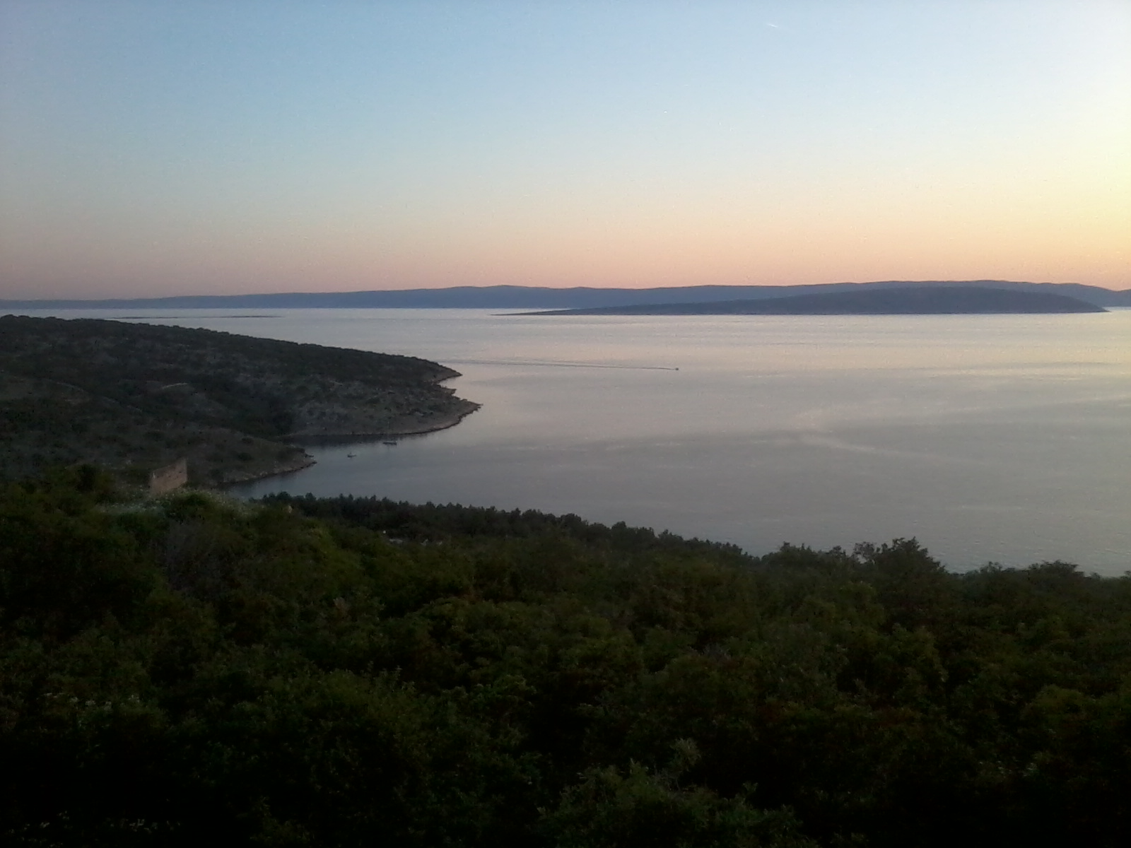 Uvala Konobe na jugozapadnoj strani otoka Krka; Hrvatska. Na prednjem dijelu slike je lokalitet Mala Krasa; lijevo je rt Negrit, a u njegovoj pozadini se vide niski otočići Kormati. Desno od njih je otok Plavnik. Duž pozadine cijele slike je otok Cres.